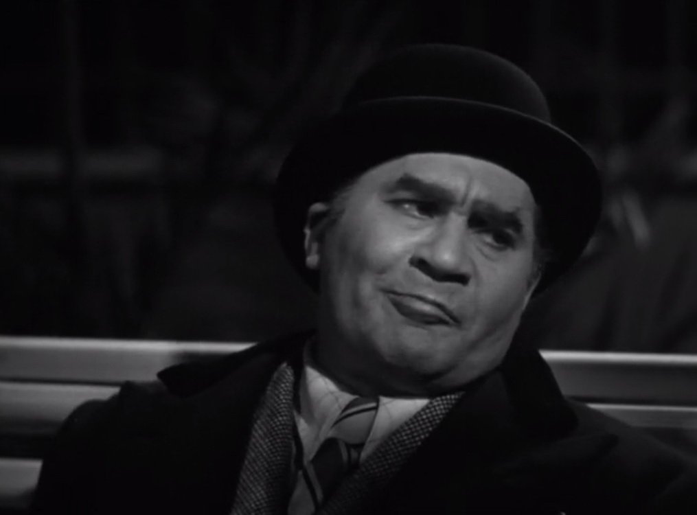 Screenshot dal film Imputato, alzatevi! (1939)